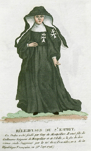 Collection de costumes de tous les ordres monastiques, supprimés à differentes époques, dans la ci-devant Belgique, Bruxelles, Philippe Joseph Maillart et sœur, 1811